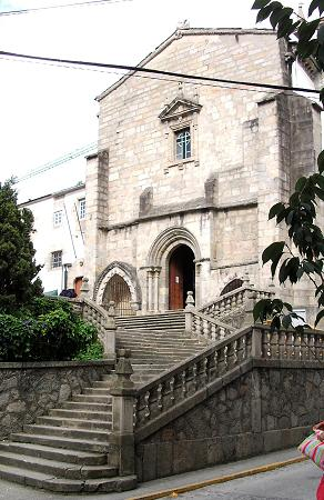 A igrexa de San Francisco, no núcleo urbano de Viveiro. Á beira esquerda da foto, o claustro. Obtida por user:Agremon o 31/07/05. Uploaded by User:Agremon